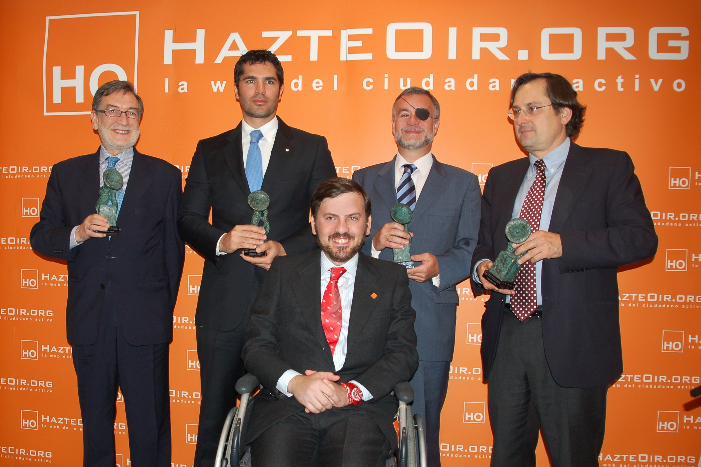 Entrega de los Premios Hazte Oir 2009 en el Hotel NH Eurobuilding de Madrid